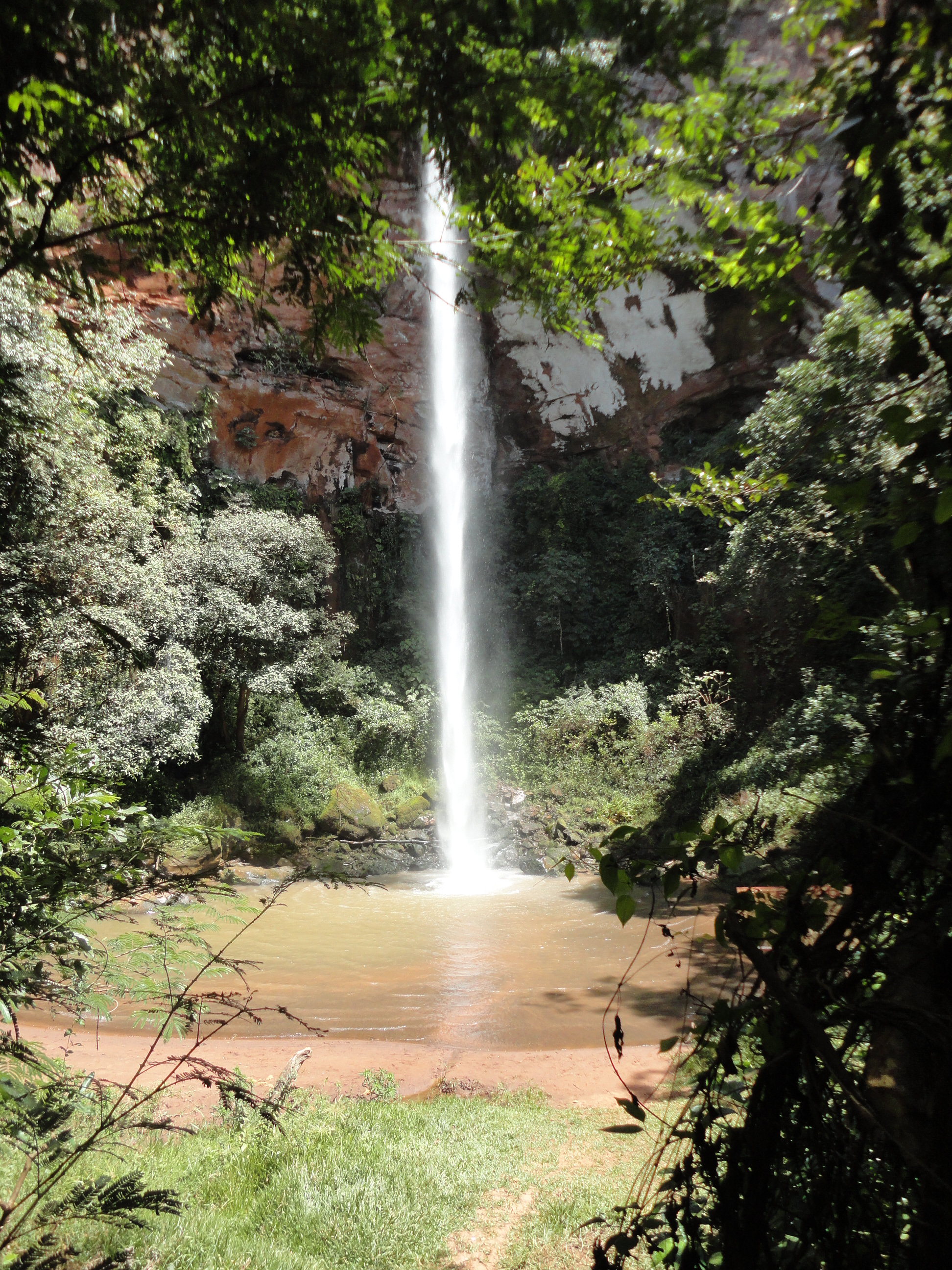 Cachoeira do Itambé em Altinópolis